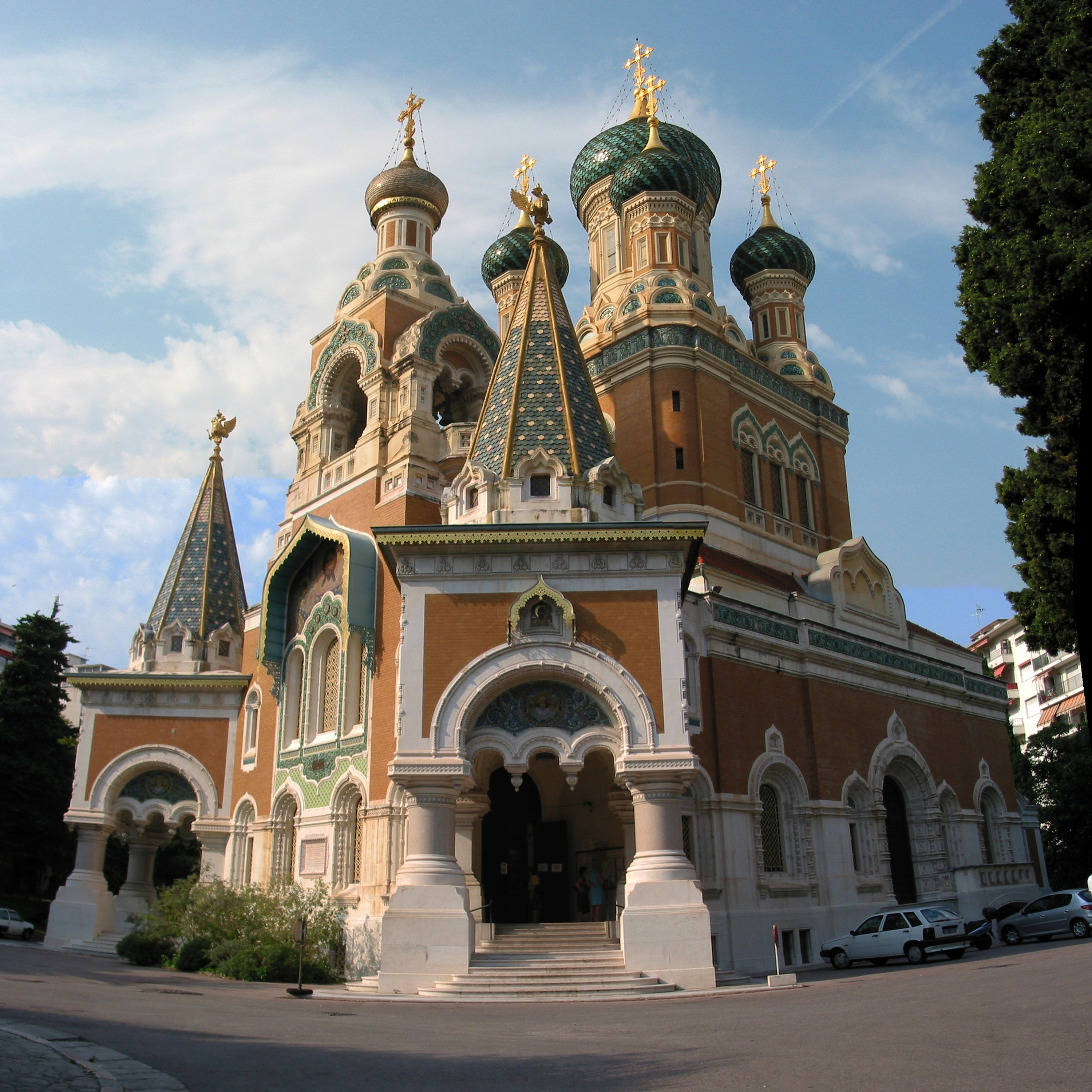 Cathédrale Saint-Nicolas à Nice.